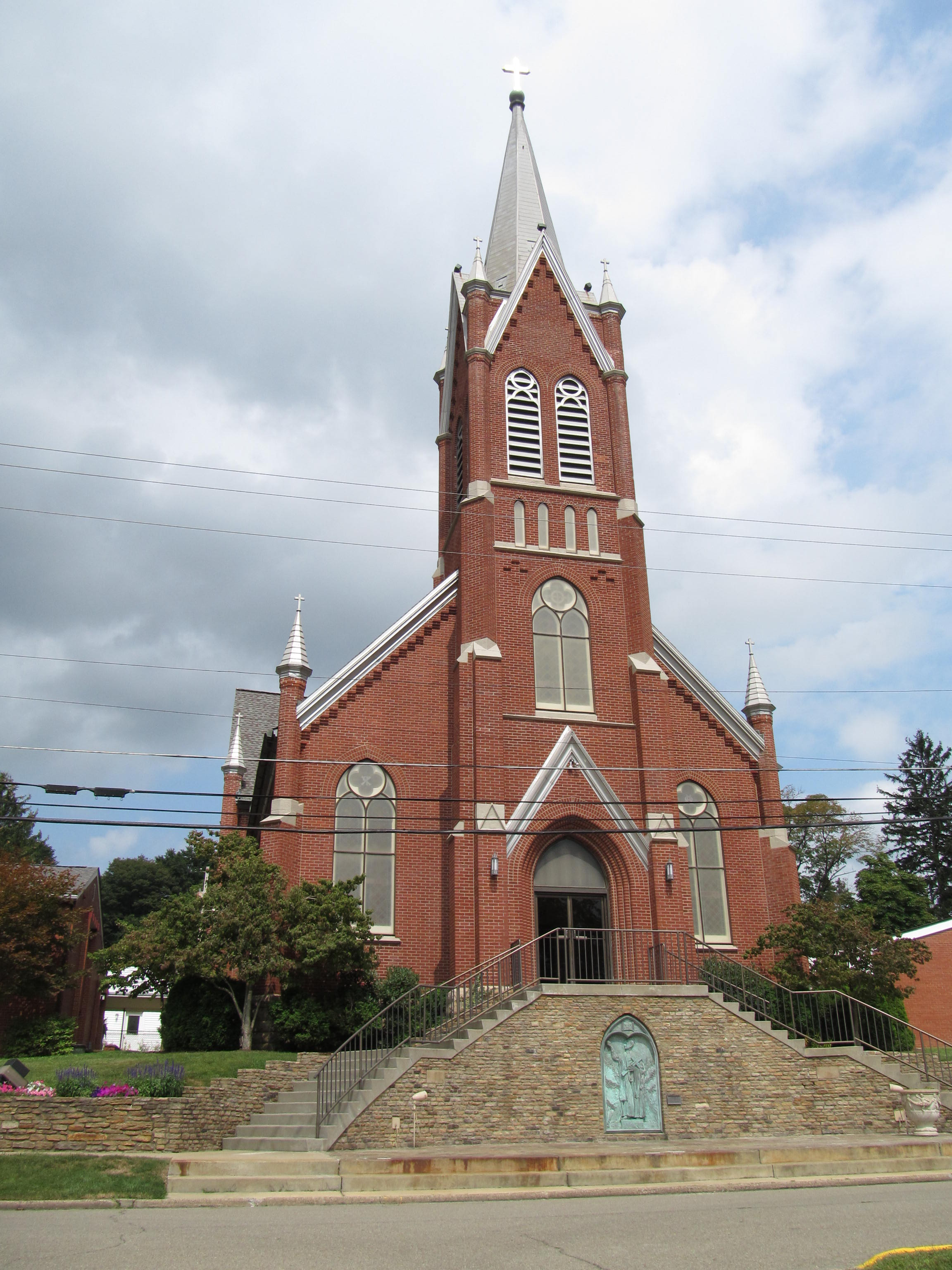 New Bethlehem, Pennsylvania